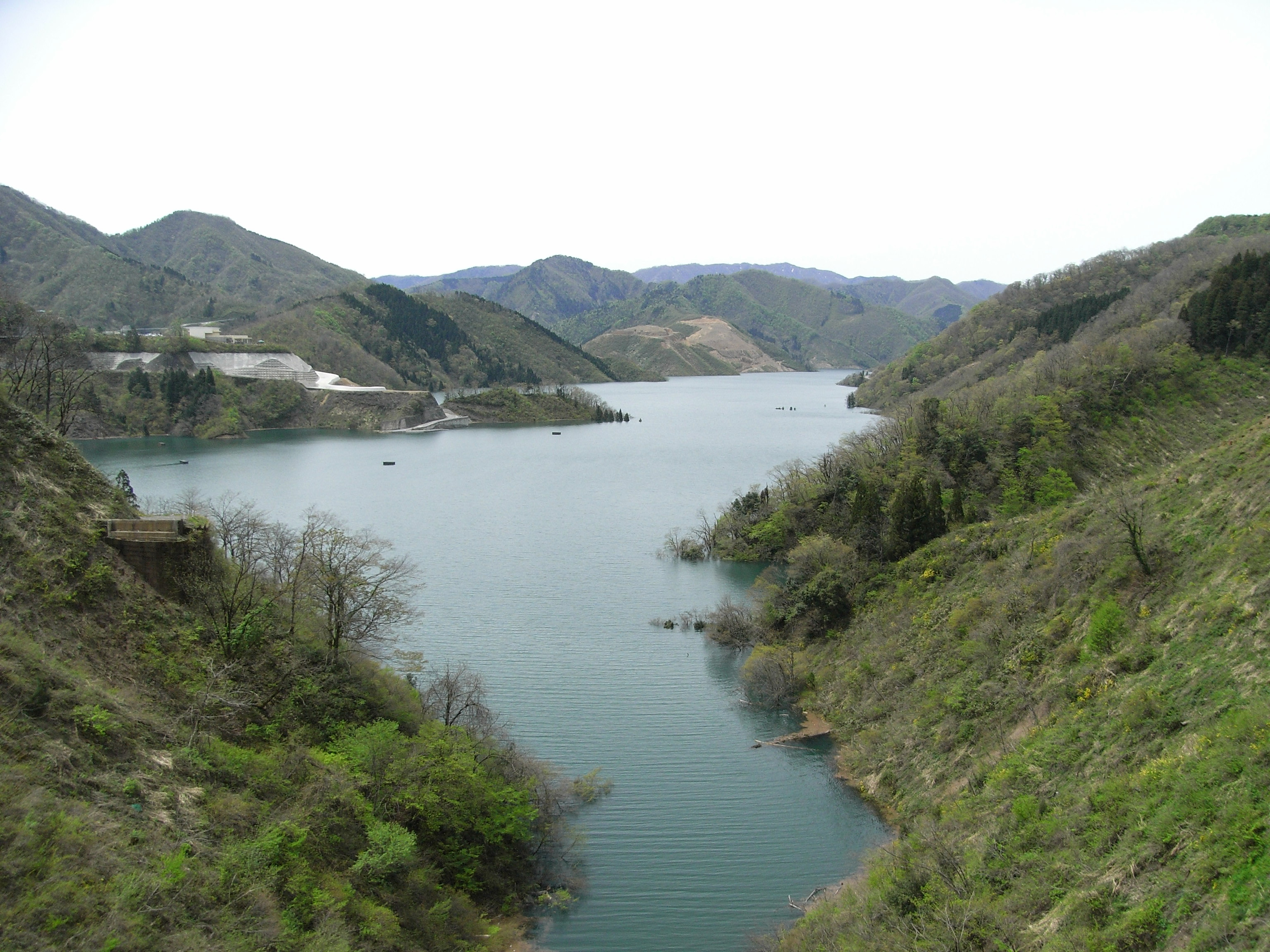 Lake